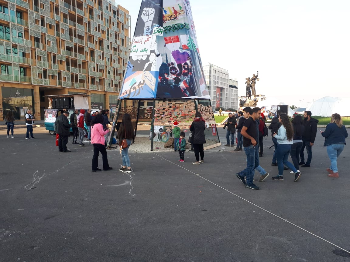 Proteste auf dem Beiruter Märtyrerplatz Dezember 2019